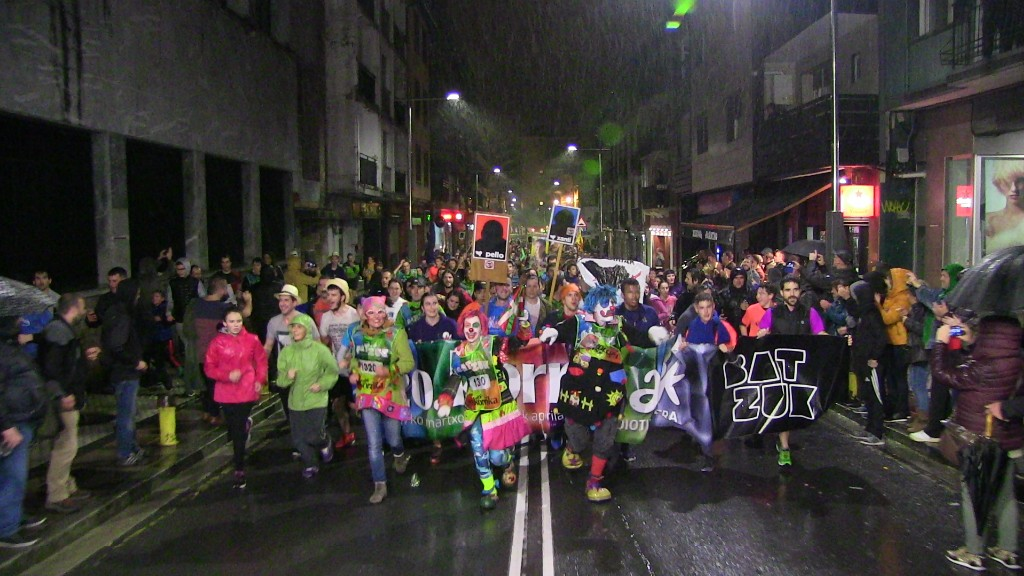 Korrika 2017 Lasarten barrena